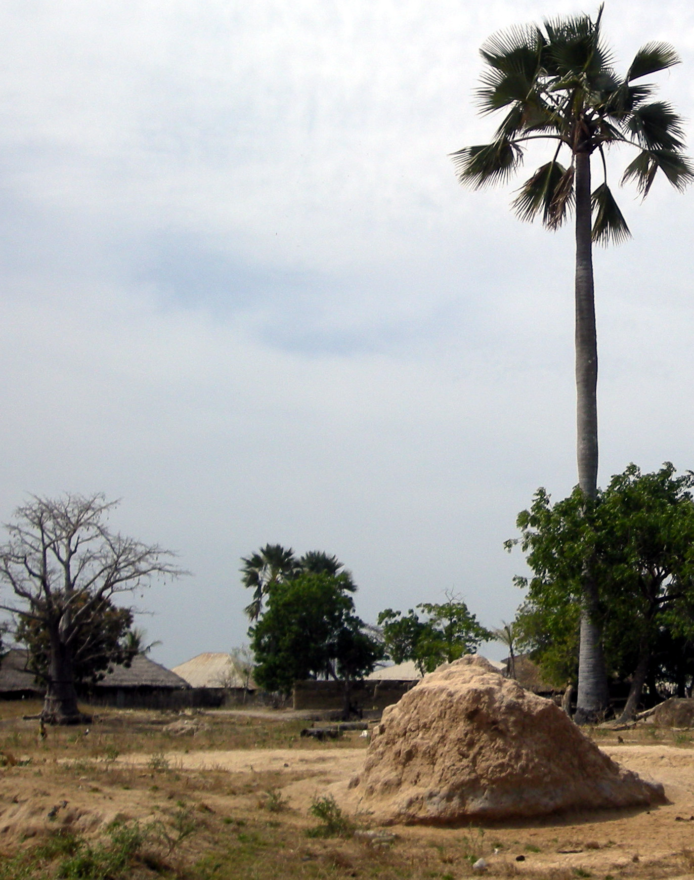 Termitière à Séléki (Casamance, Sénégal)